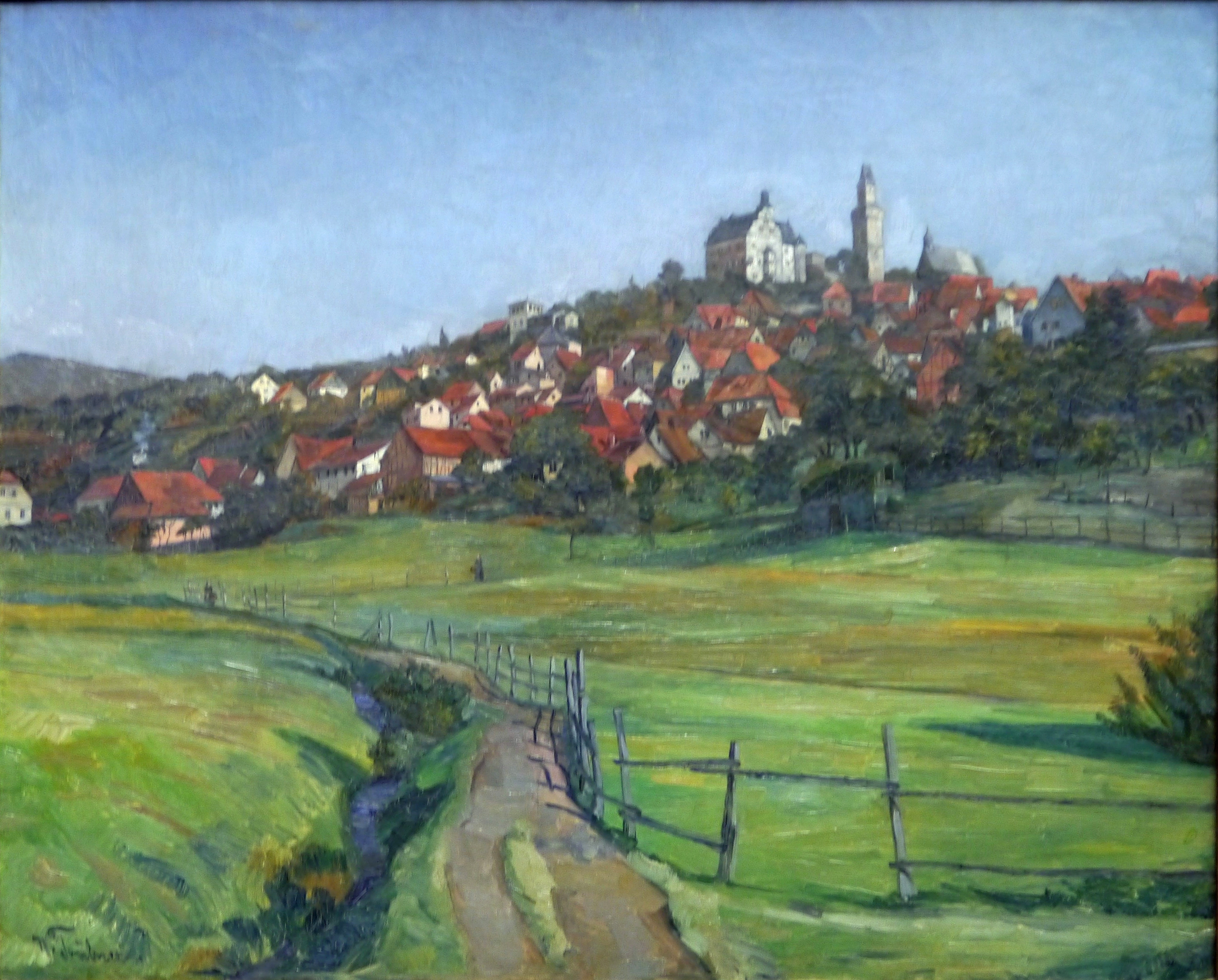 Ansicht von Kronberg im Taunus